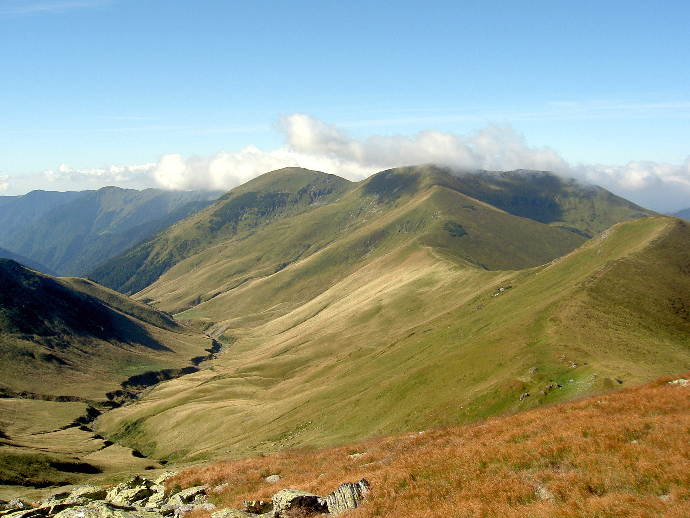 Rodna